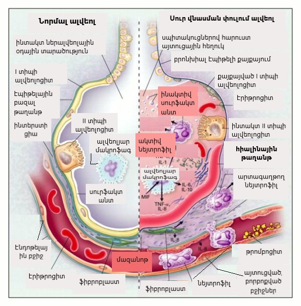 Նորմալ ալվեոլի (ձախից) և ալվեոլի սուր վնասման (աջից) համեմատական պատկերը։ Սուր շնչառական դիսթրես համախտանիշի ախտածագման մեխանիզմը։